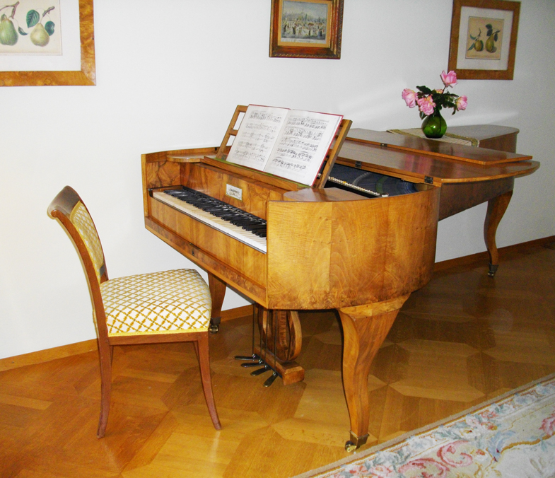 BENIGNUS SEIDNER VIENA 1815